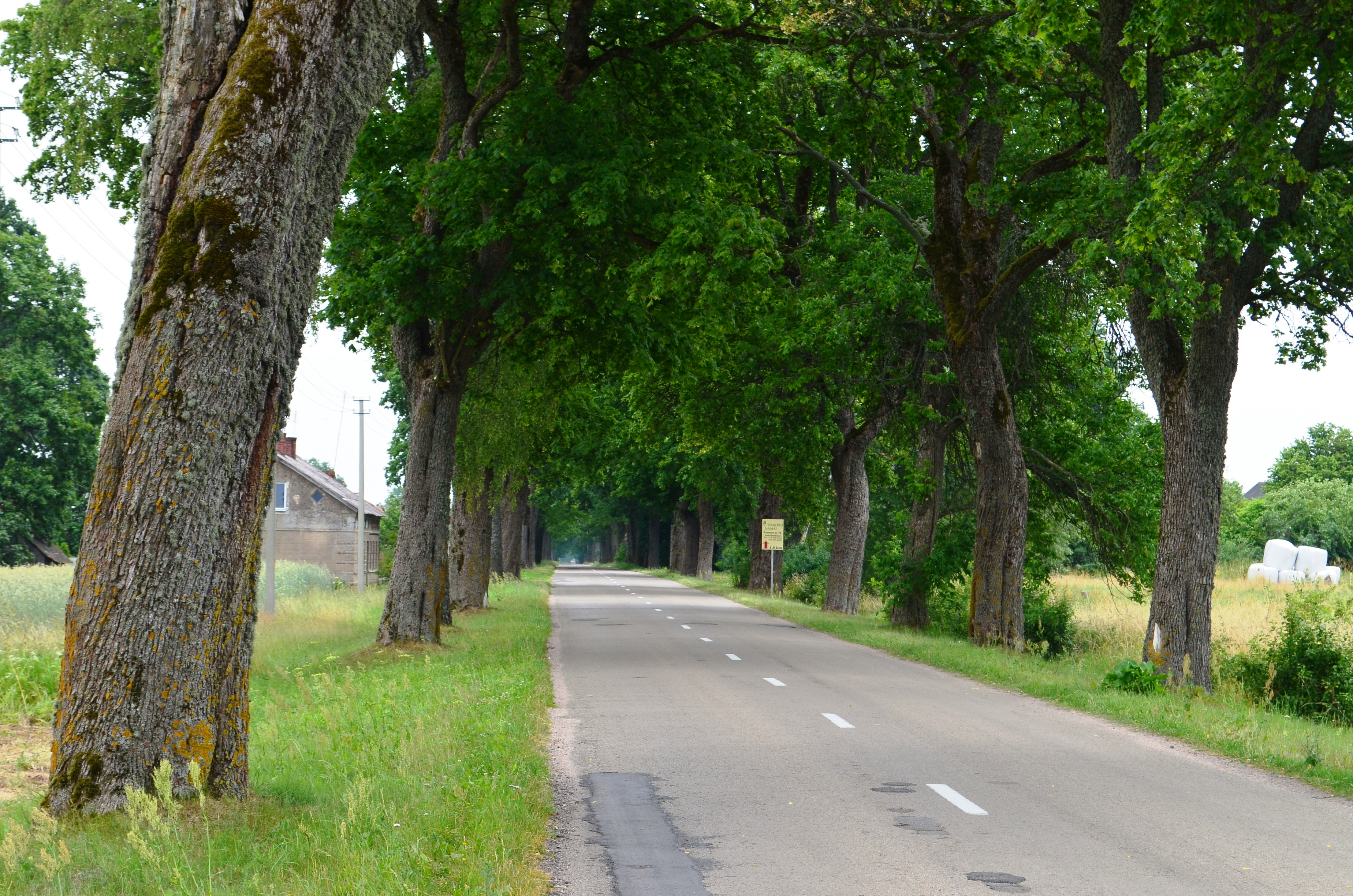 Smalininkų ąžuolų alėja, Vidkiemis, Jurbarko raj.